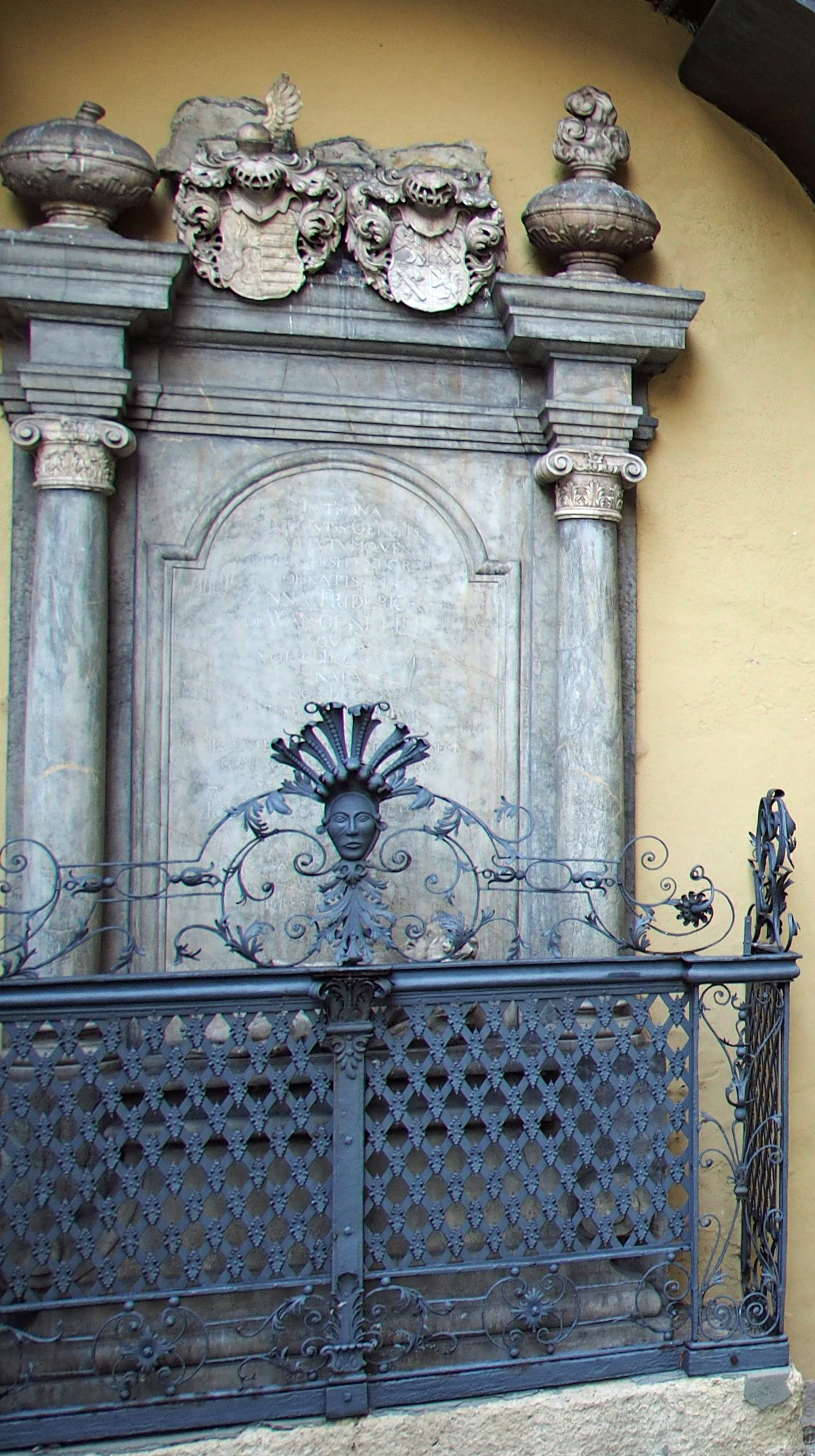 Epitaph Anna Friederica von Geißmar geb. von Wangenheim († 1. September 1740), Ehemann Johann Georg von Geißmar, Wirklicher Geheimer Rat von Sachsen-Gotha-Altenburg und Comitialgesandter. Auf dem Gesandtenfriedhof an der Dreieinigkeitskirche Regensburg (Ostseite)